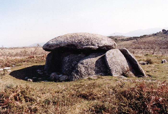 Anta da Aboboreira - dolmen - Baião Portugal 1982